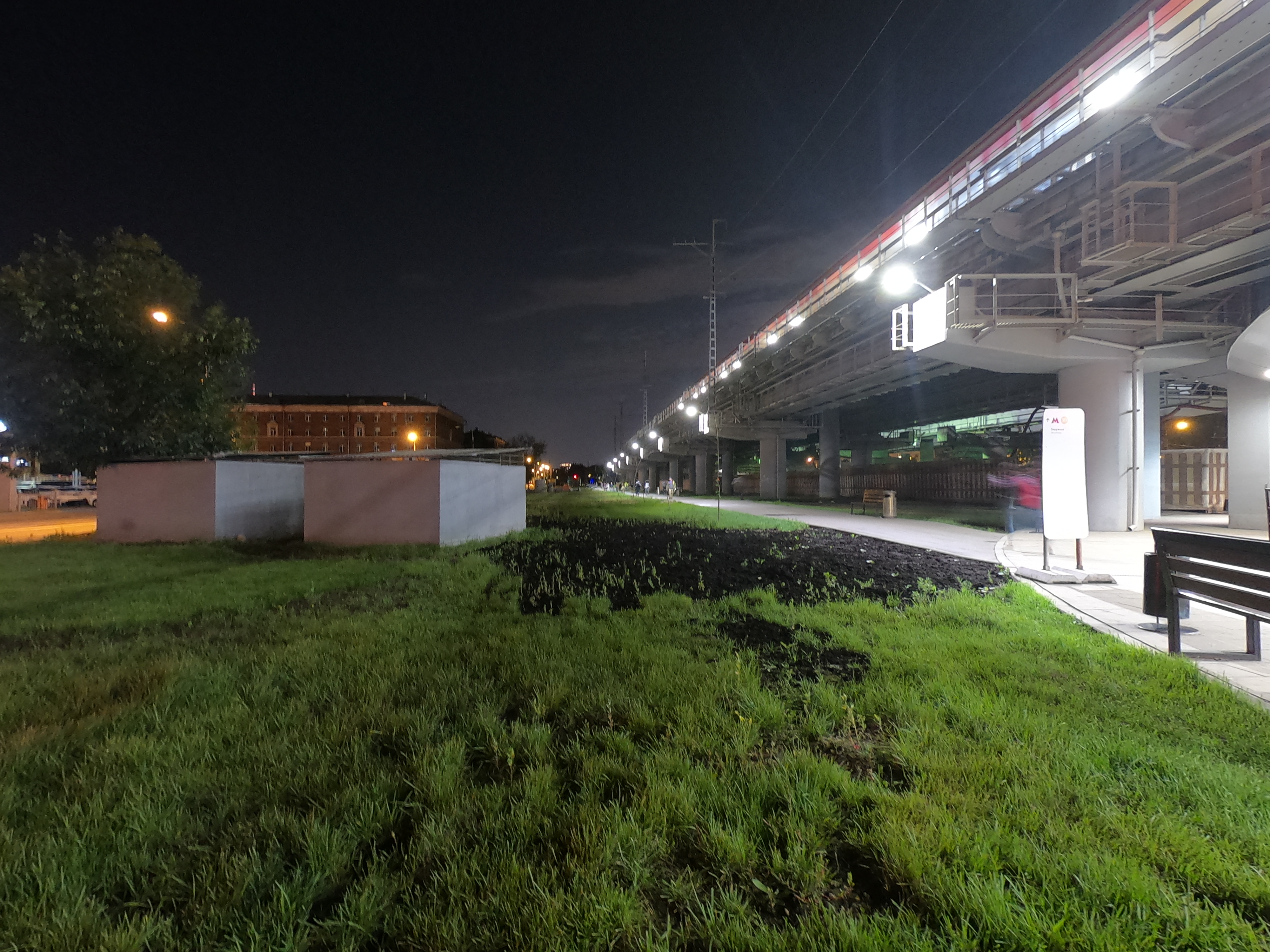 Эстакада Савёловского направления МЖД у платформы Окружная. Вид со стороны Гостиничного проезда